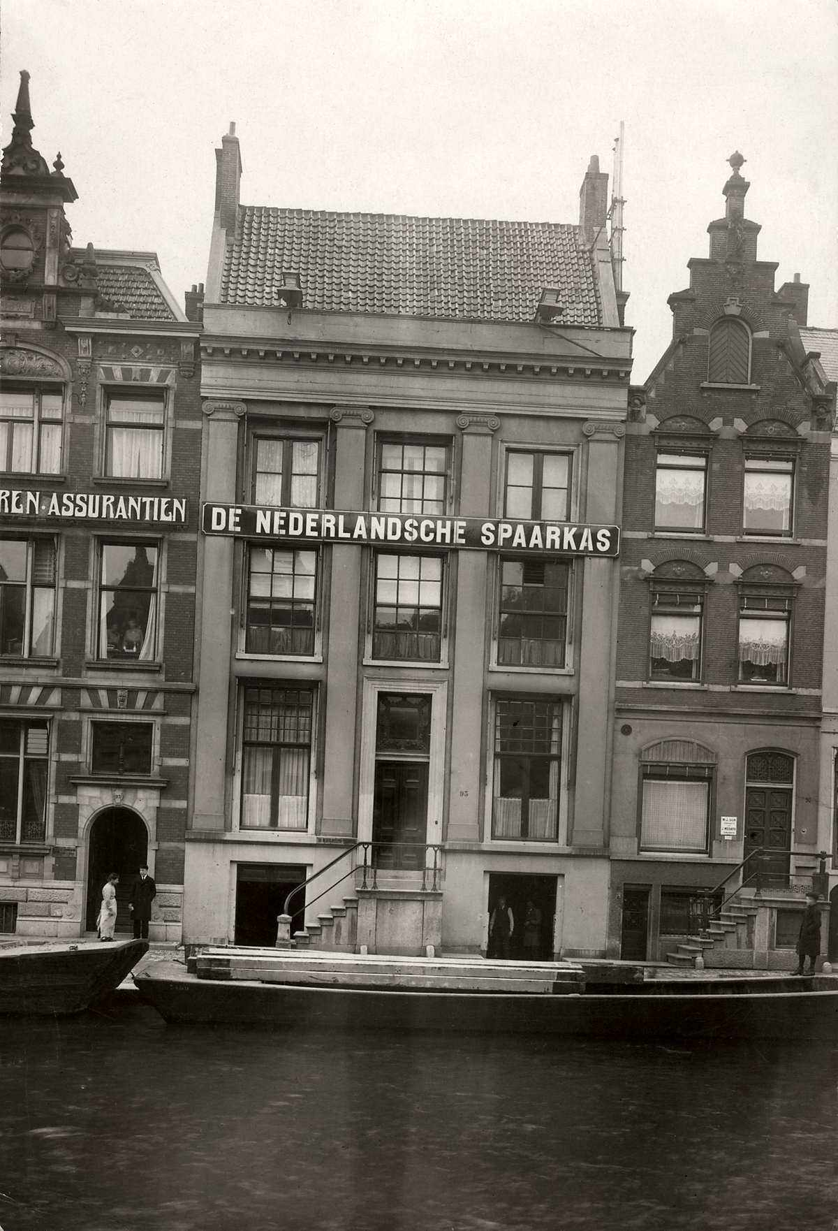 Nederlandsche Spaarkas Rokin Amsterdam